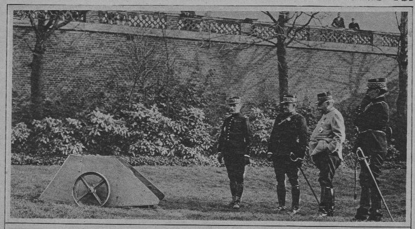 Miroir n° 75 page 10 : Foch Maistre Joffre et Maud'huy se font présenter une armure pour fantassin.